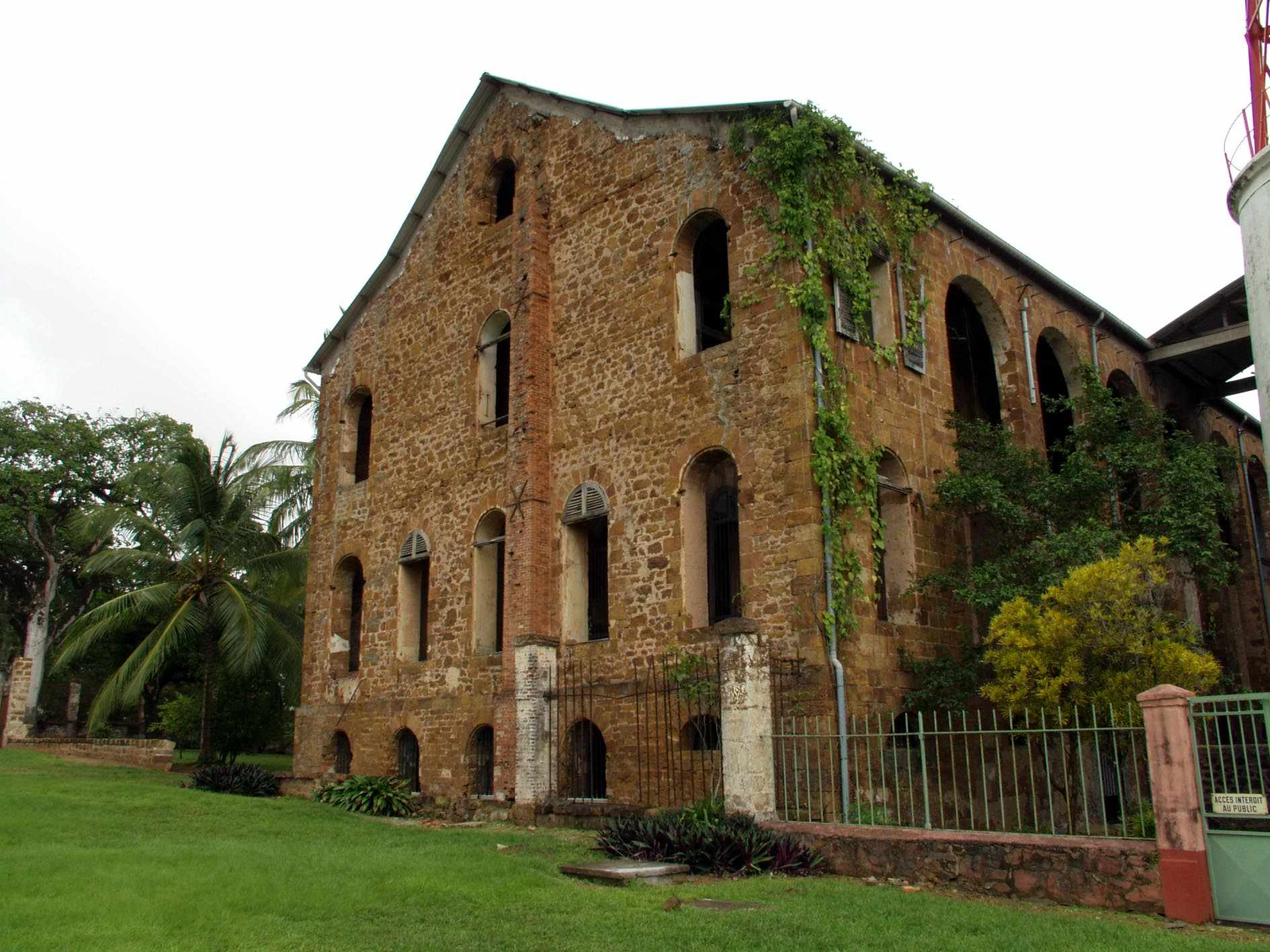 bagne des Iles du Salut en Guyane (France)